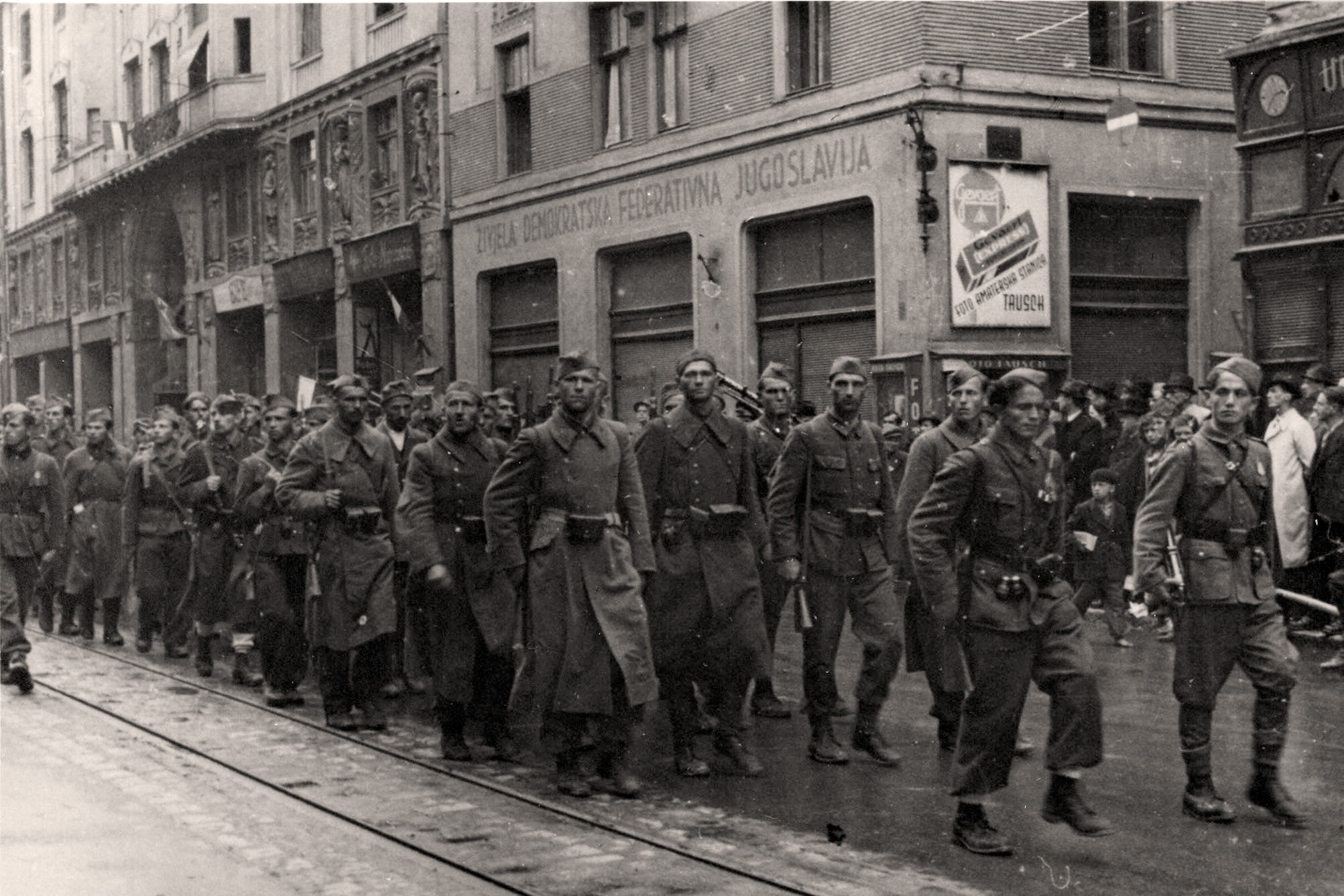 Srpskohrvatski / српскохрватски: Jedinice 3. korpusa NOVJ ulaze u oslobođeno Sarajevo 6. aprila 1945.godine.